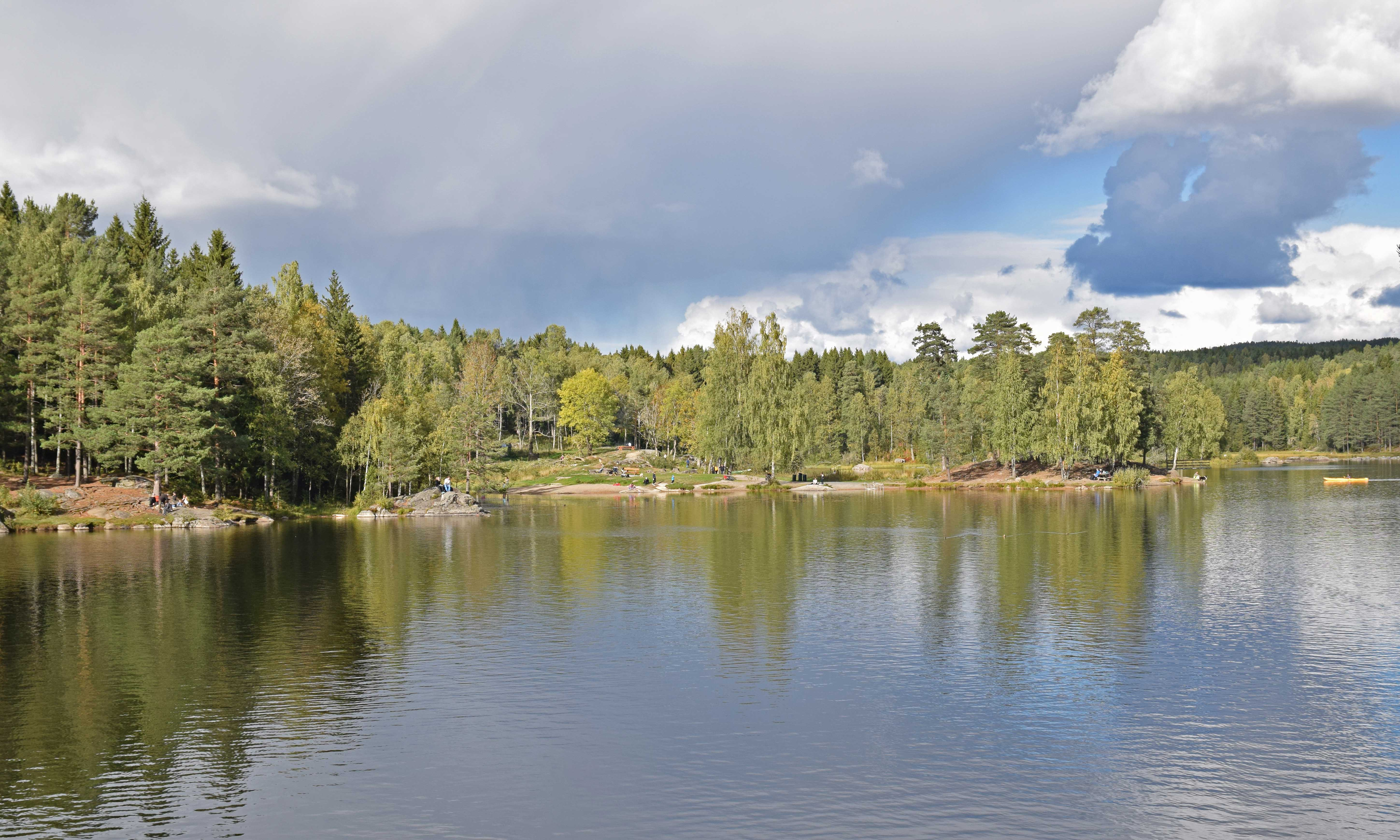 Badeplassen ved Nøklevann, september.